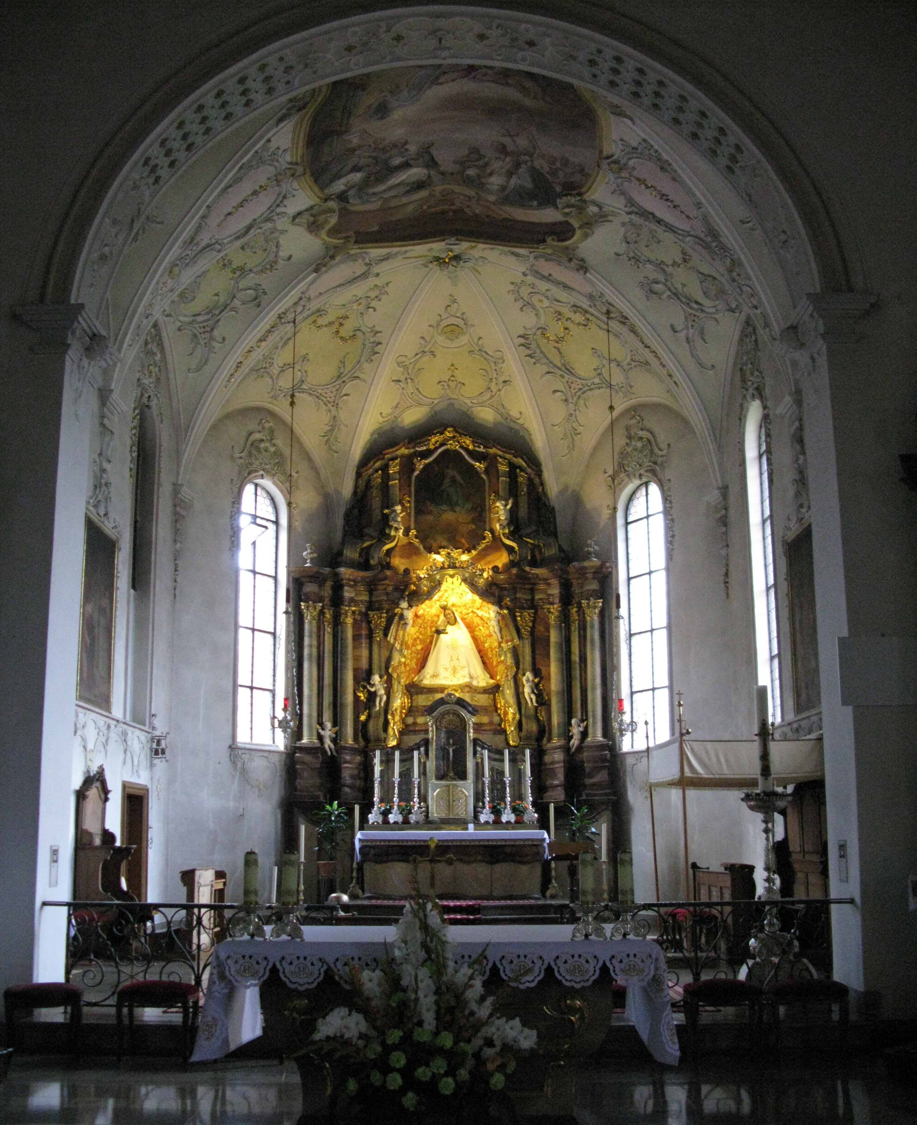 Wallfahrtskirche Todtmoos, innen